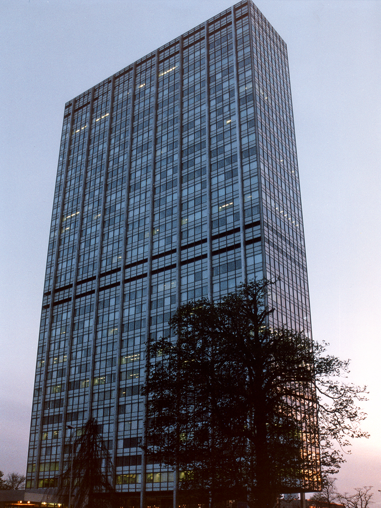 Bayer Hochhaus in Leverkusen Wiesdorf